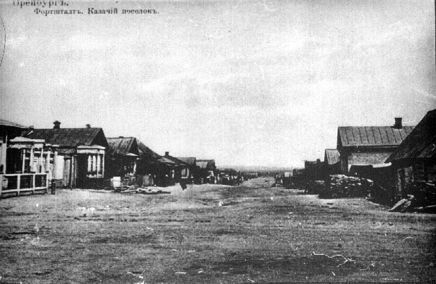 Оренбург, Фортштадт, казачий поселок (начало XX века)